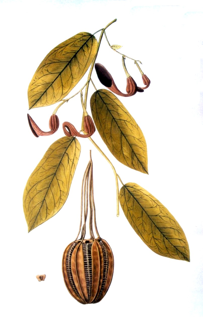 Aristolochia_maxima Jacq.